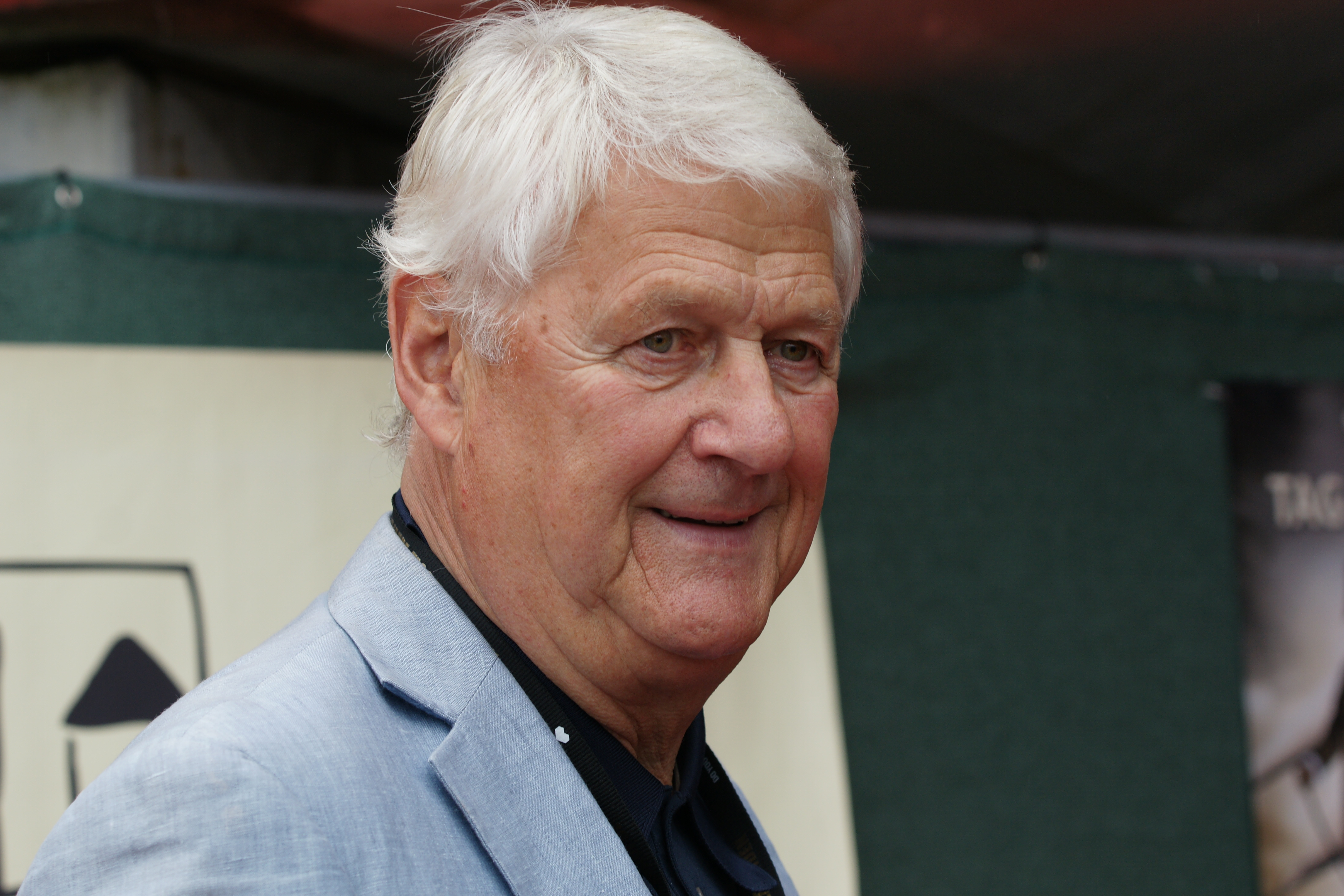 Tag der Legenden 2014 - Die Kapitäne entern Hamburg Fußballfest am Millerntor zugunsten NestWerk eV